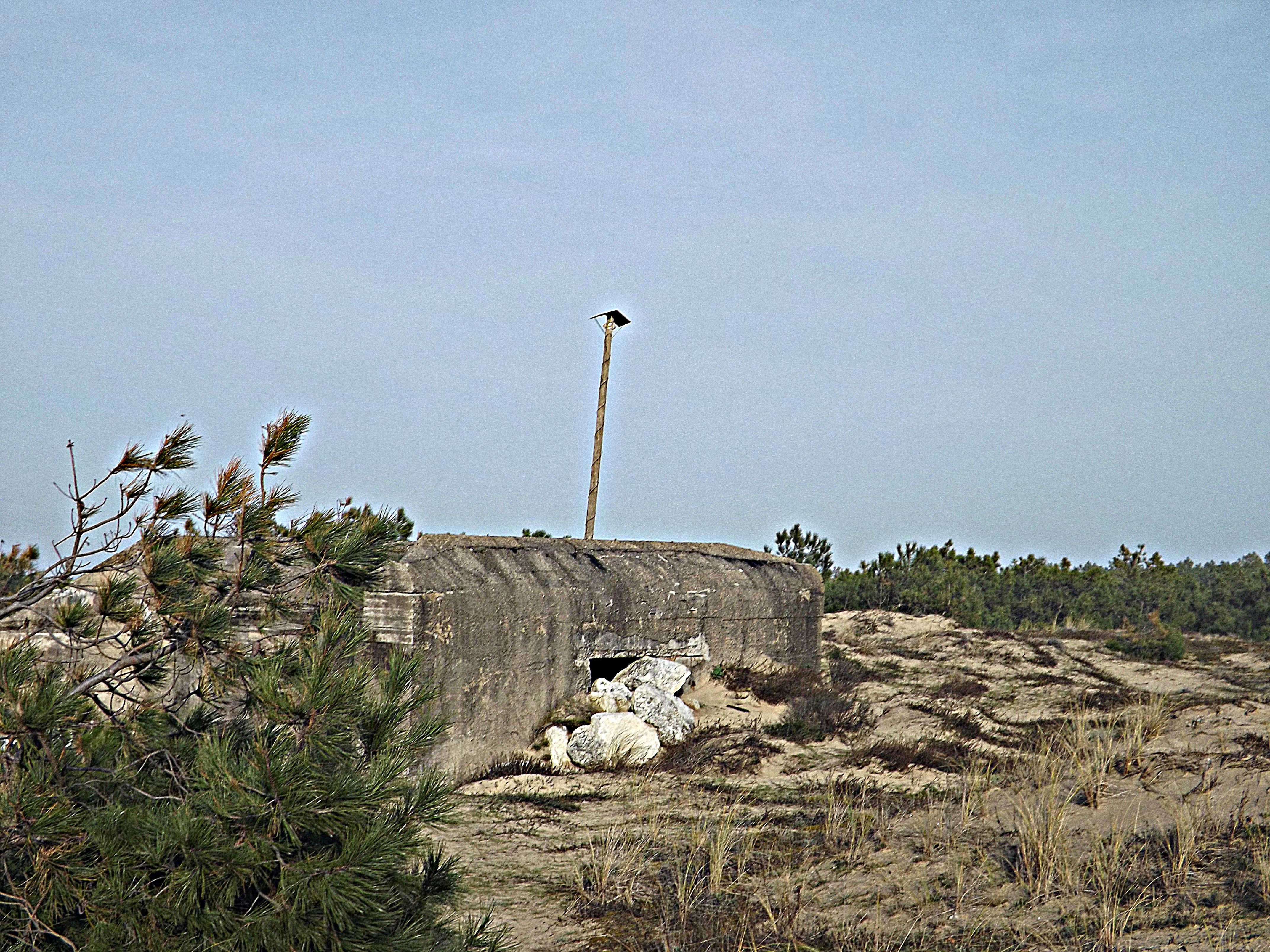 Blockhaus construits dans les dunes de la pointe espagnole.